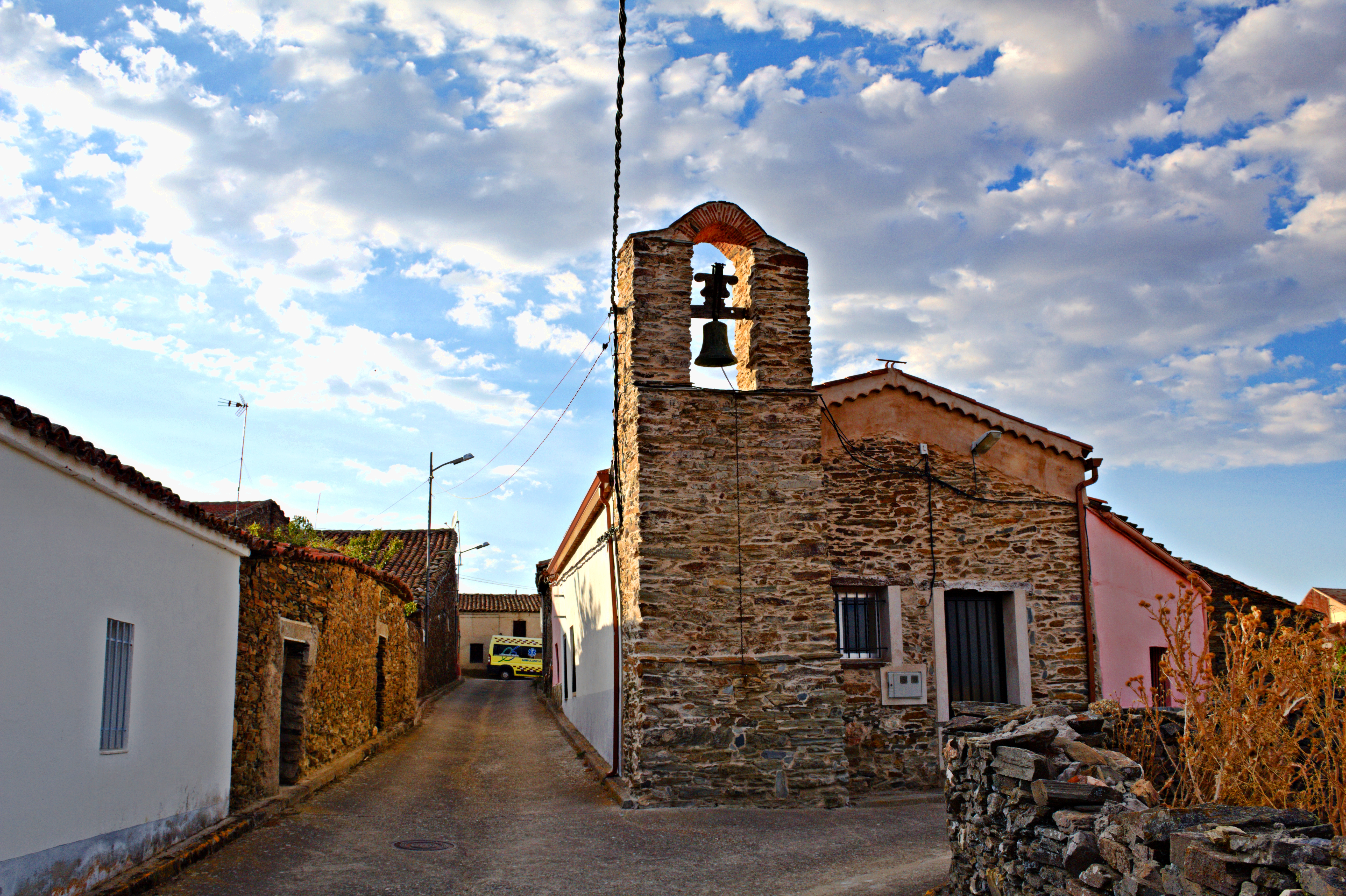 Aldeavieja de Tormes, provincia de Salamanca